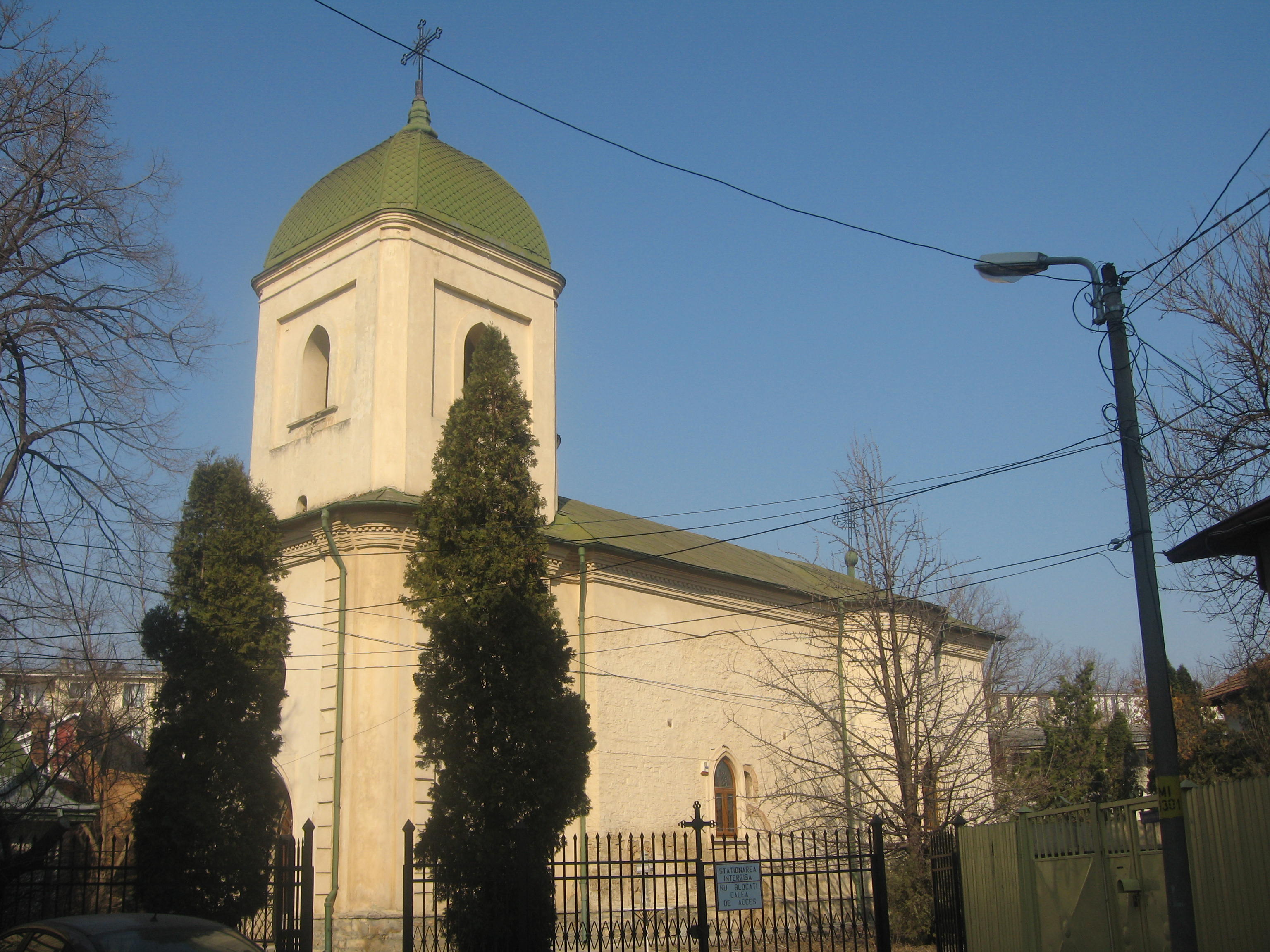 Biserica "Sf. Dumitru" - Balș din Iași